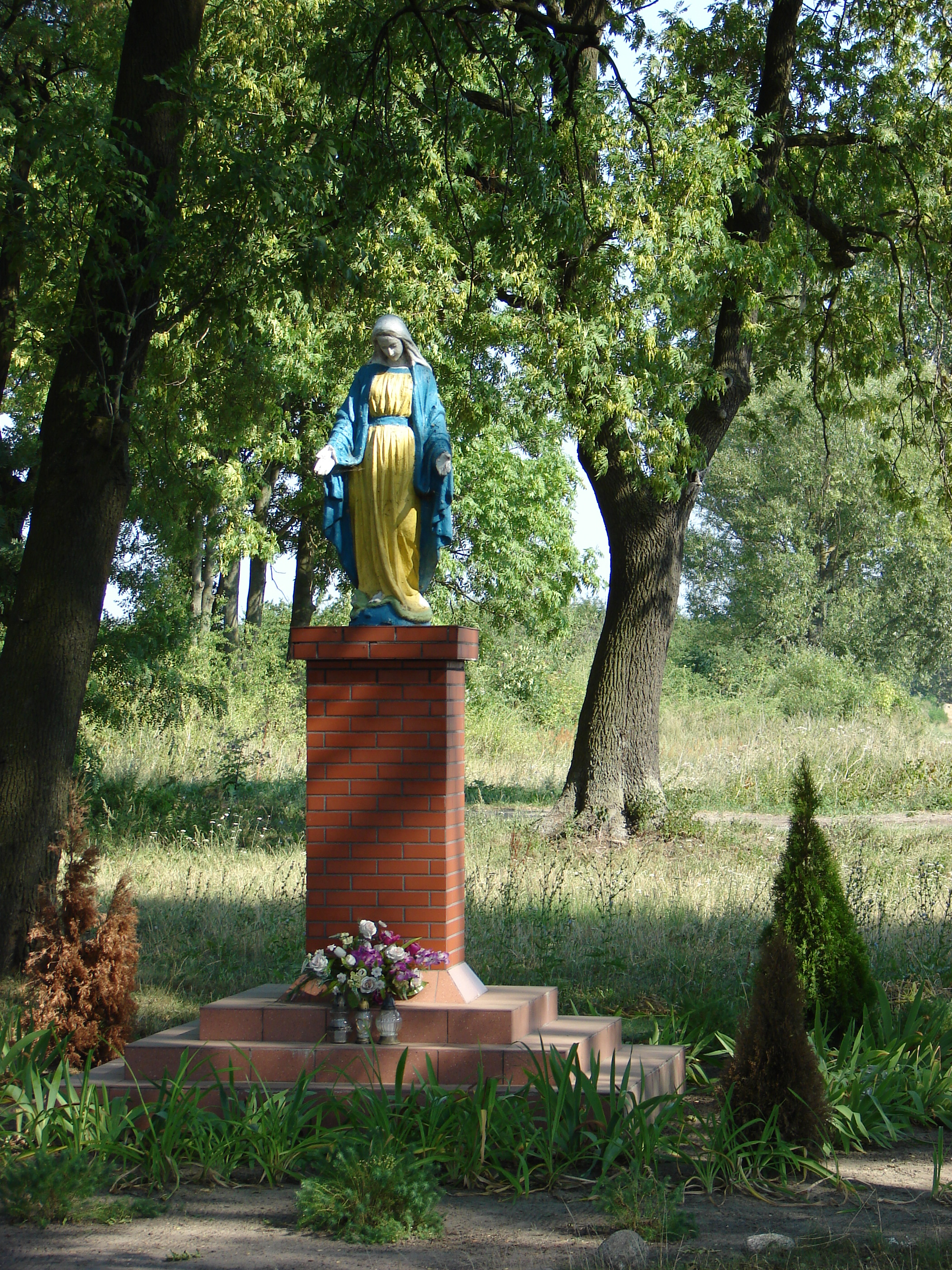 Kotków, Łęczyca County. Figure of Virgin Mary in the former manor park.